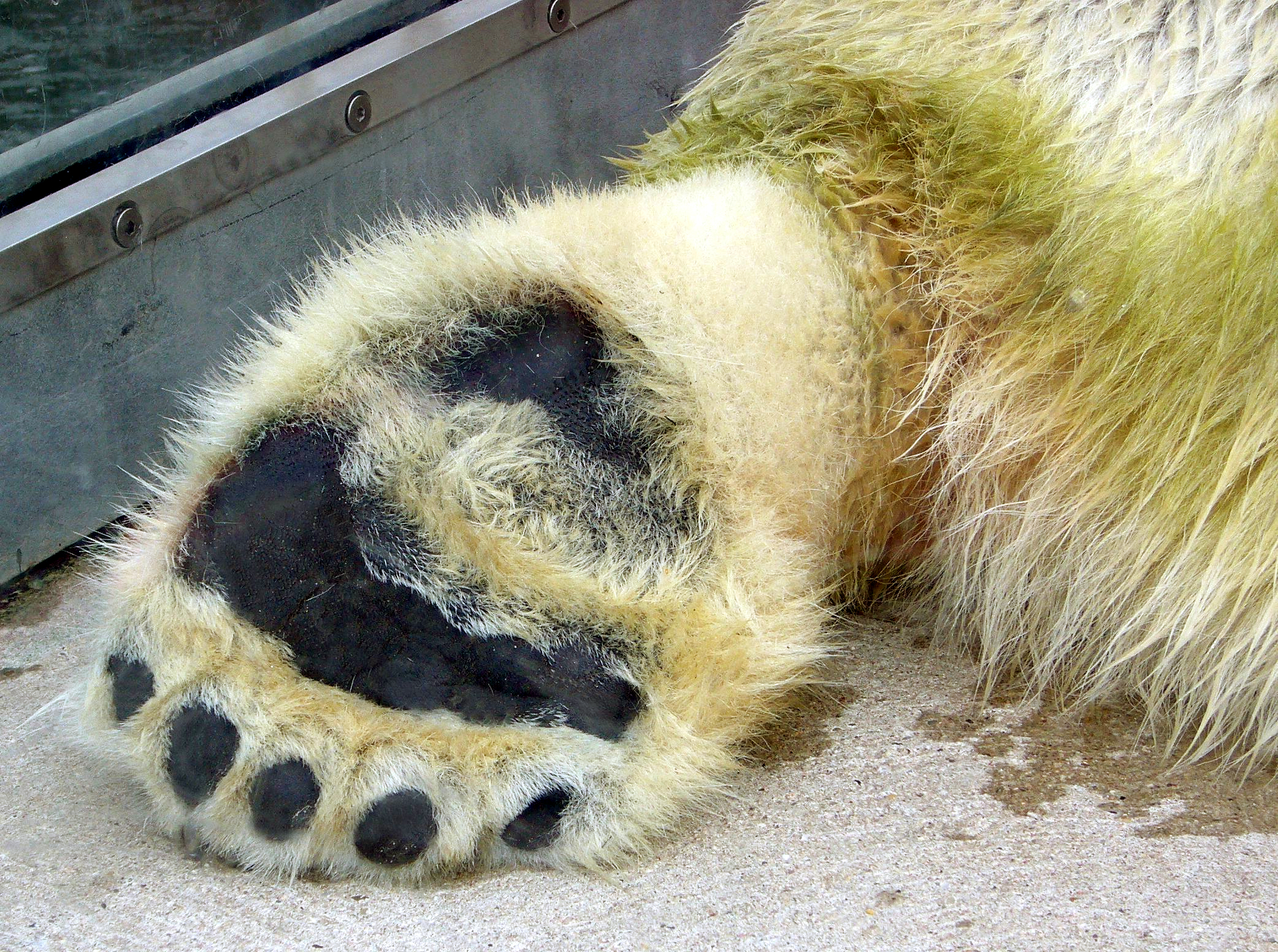 Hintertatze eines Eisbären im Karlsruher Zoo